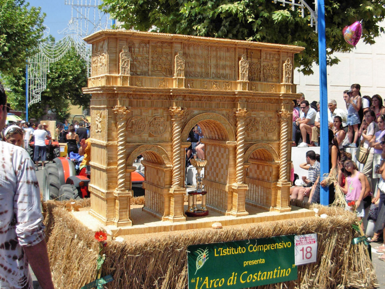 Riproduzione dell'Arco di Costantino di Roma durante la Festa del Grano di Foglianise (BN), Italia